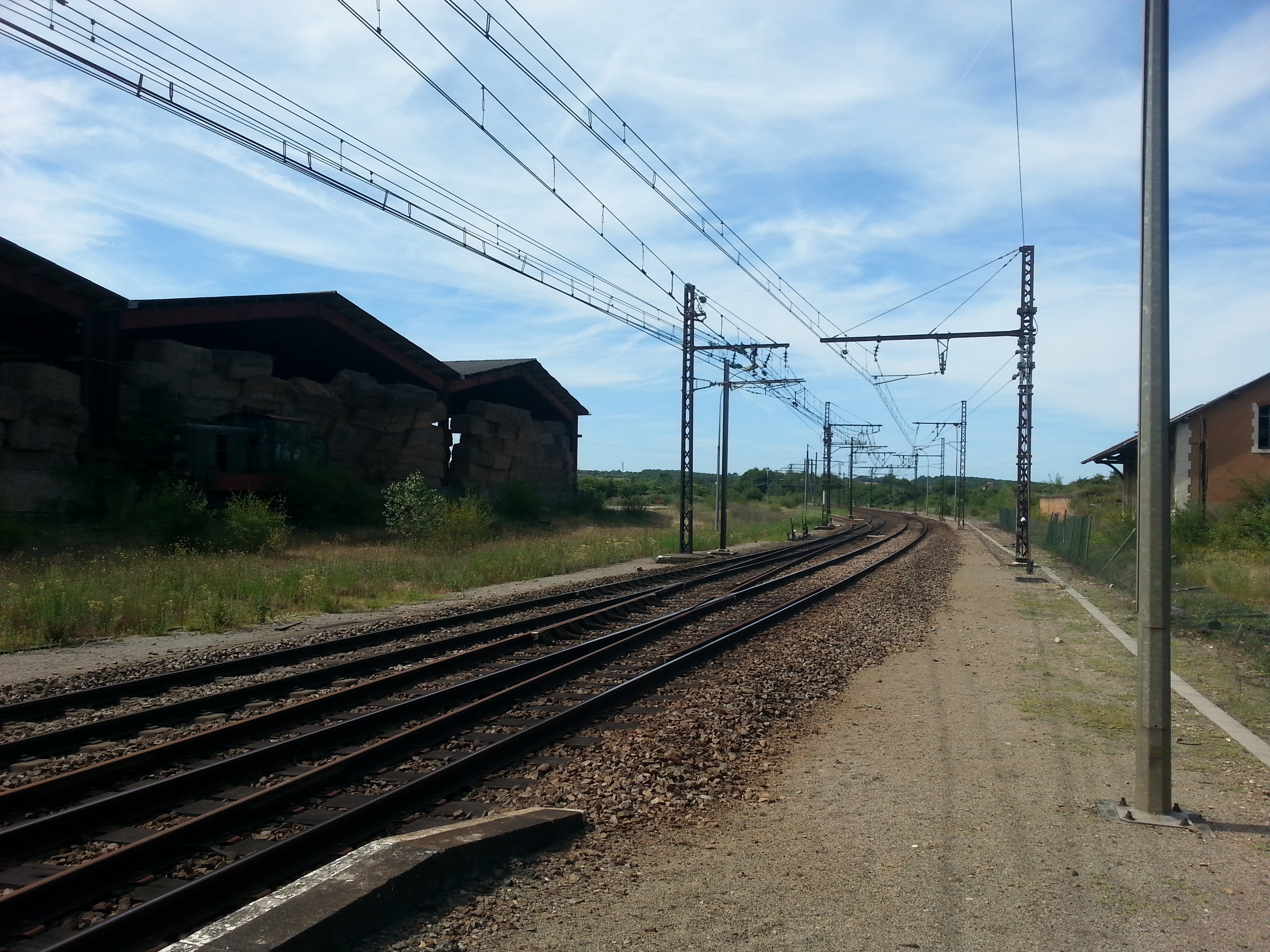 Gare de Celon (36) : Les voies et le centre de stockage d'argile et de barytine.